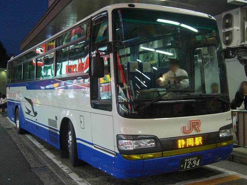 登録番号 名古屋200か12-94 ジェイアール東海バス(JR Tokai Bus)所属 高速用車両 （各系統で共通運用） 日野・セレガ KL-RU4FSEA